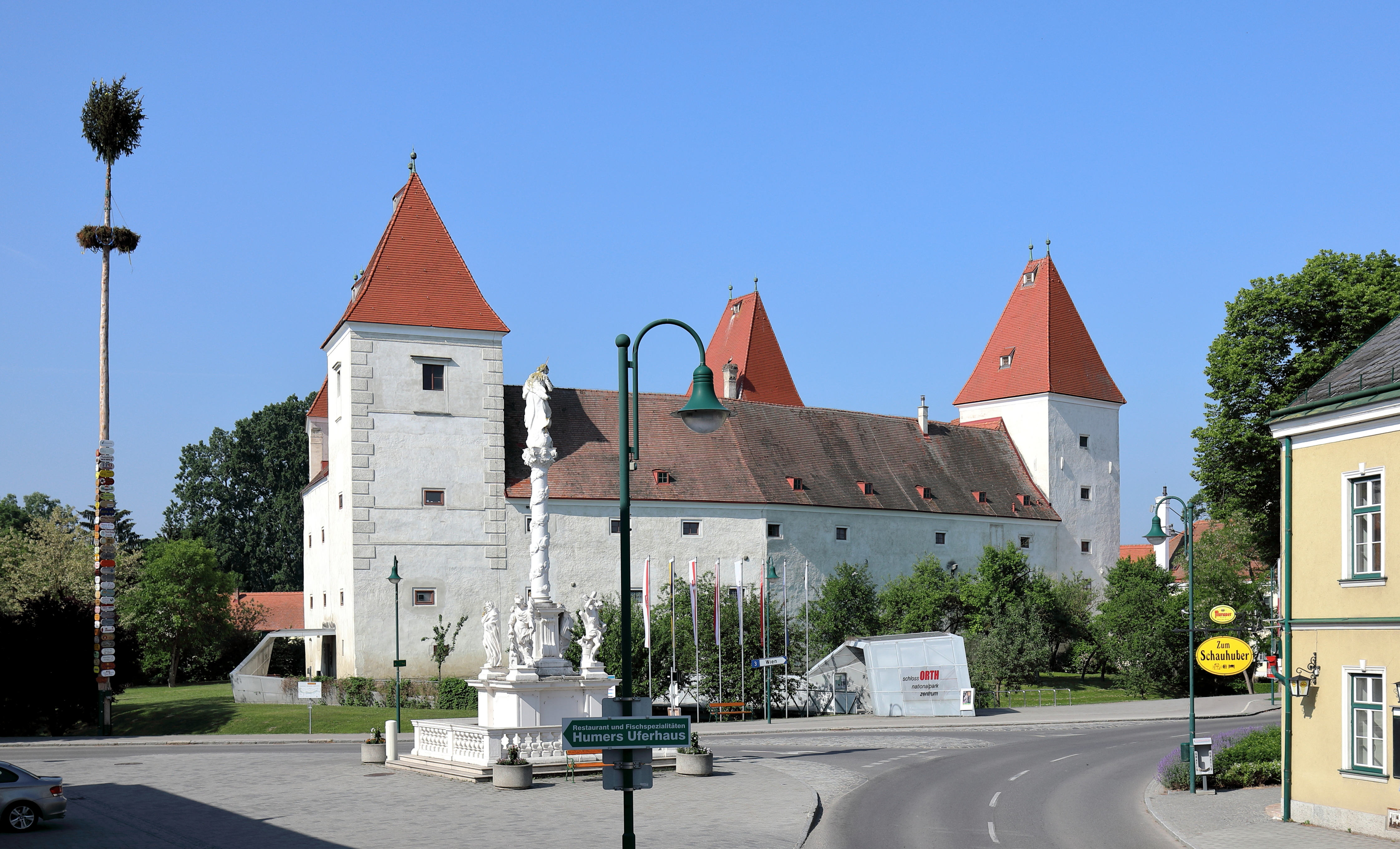 Das Ortszentrum der niederösterreichischen Marktgemeinde Orth an der Donau. Links der Maibaum, im Zentrum das Schloss Orth, das als Besucherzentrum des Nationalparkes Donau-Auen dient und davor die Mariensäule.